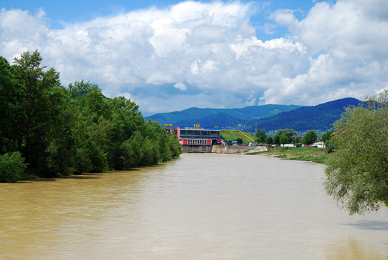 Bistriţa river in Piatra Neamţ